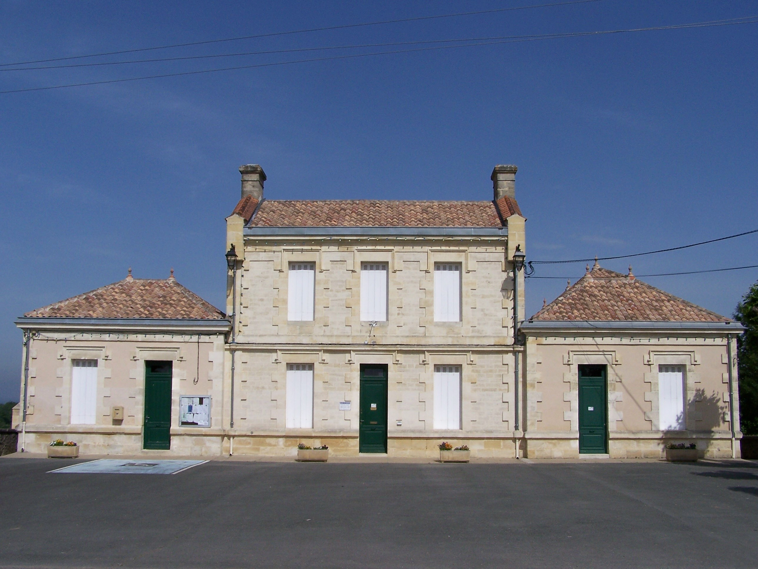 Mairie de Gabarnac, Gironde, France